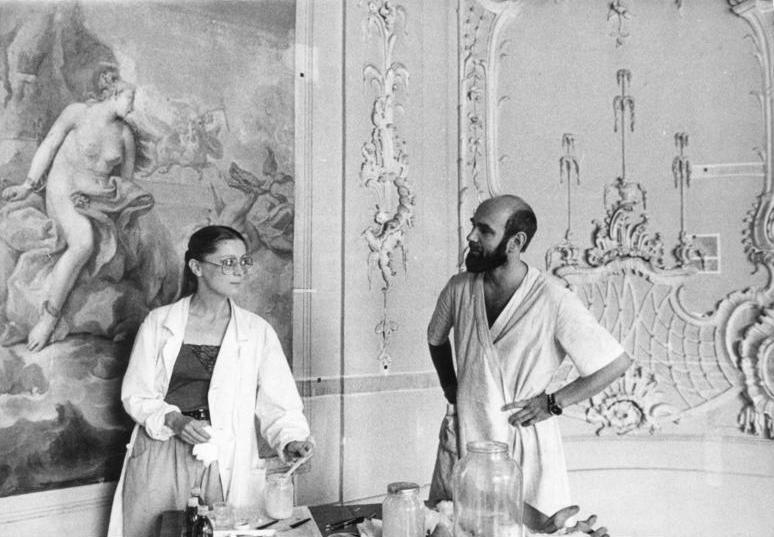 Nischwitz, polnische Restaurateure im Schloss ADN-ZB/Grubitzsch/22.8.1988/Bez. Leipzig: Beim Sommerseminar polnischer Restauratoren im Bezirk Leipzig arbeiten Bozena Klyszcs und Andrej Strach im Gartensaal des Schlosses von Nischwitz, in dem sich jetzt ein Feierabend- und Pflegeheim befindet. Die Fachleute fertigen ein Gutachten für spätere Restaurierungsarbeiten an. Insgesamt befinden sich 17 Krakower Restauratoren für mehrere Wochen in der DDR, um gemeinsam mit ihren DDR-Kollegen tätig zu sein. Leipzig und Krakow sind Partnerstädte.